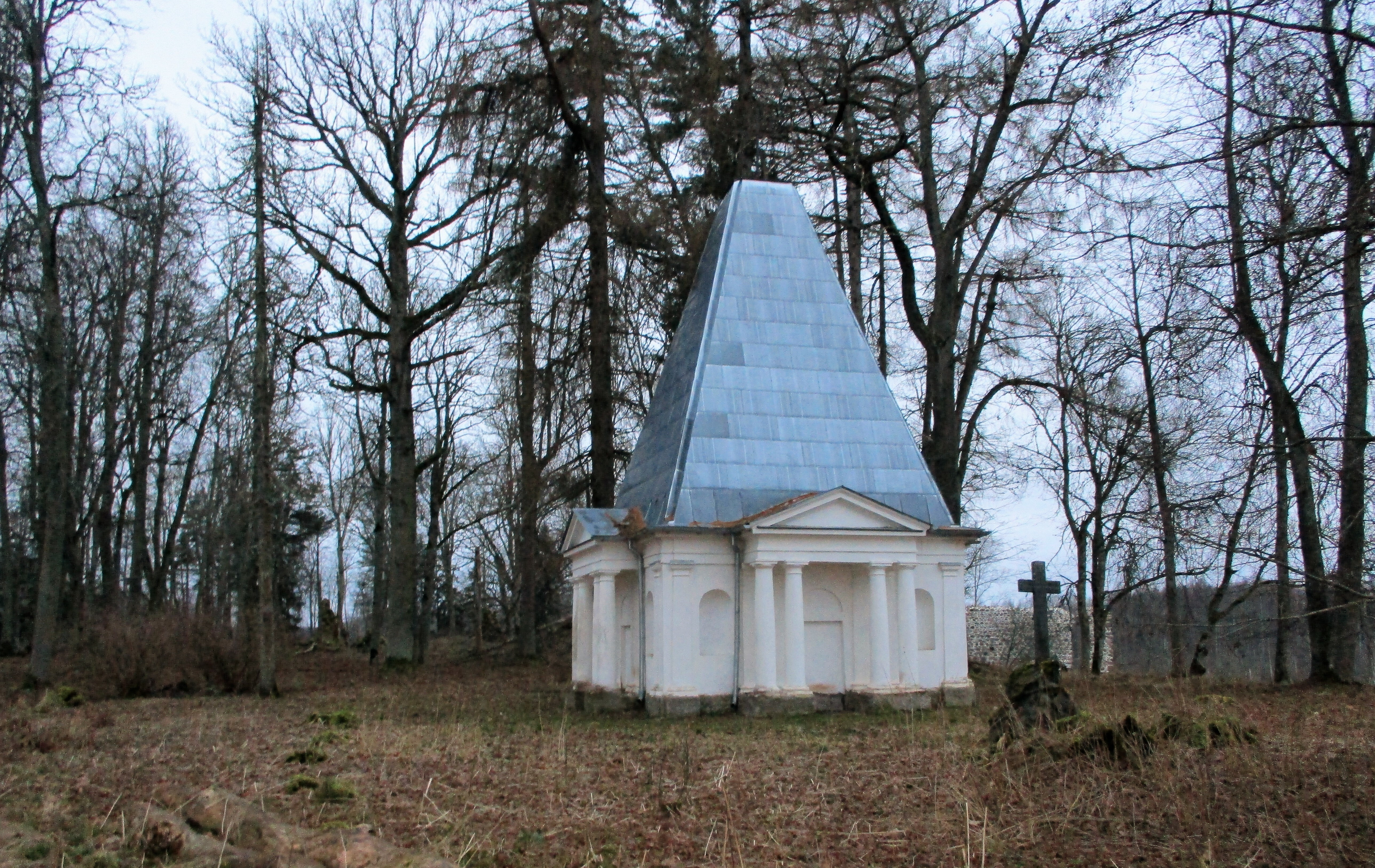 Mensenkampffide aadliperekonna matusekabel-hauakamber eeslinnuse alal. Vaade idast. Asub u. 1,2 km Tarvastu luteri kirikust kirdes Tarvastu jõe ääres vanal kõrgel jõesaarel. Linnuse juurde pääseb keerates kirikust põhja pool Väluste peale ja seal esimesest teeristist paremale.